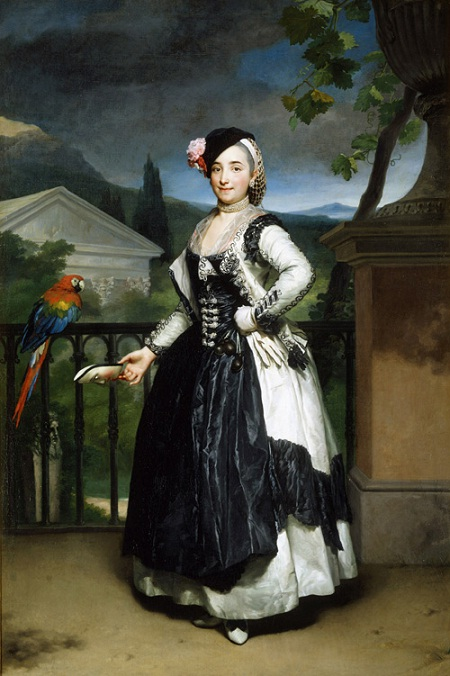 Retrato de Isabel de Parreño y Arce, marquesa de Llano y esposa de José Agustín de Llano.